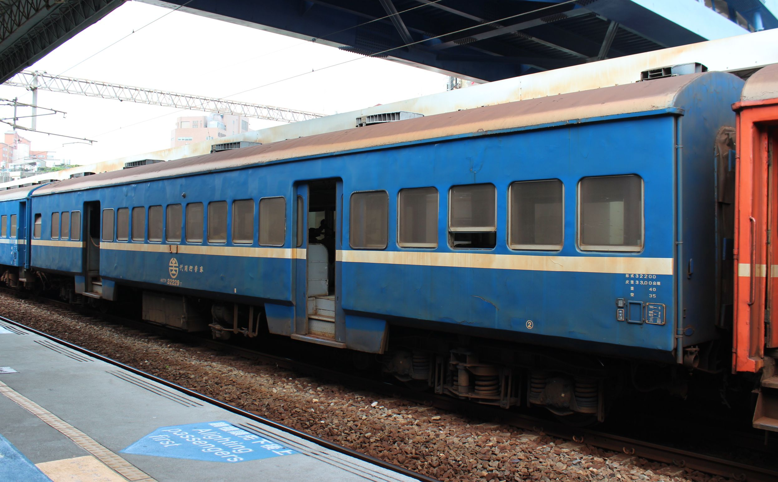 台湾鉄路管理局代用行李車40TP32229T 彰化駅で撮影 中文（台灣）: 臺灣鐵路管理局代用行李車40TP32229T 拍攝於彰化車站